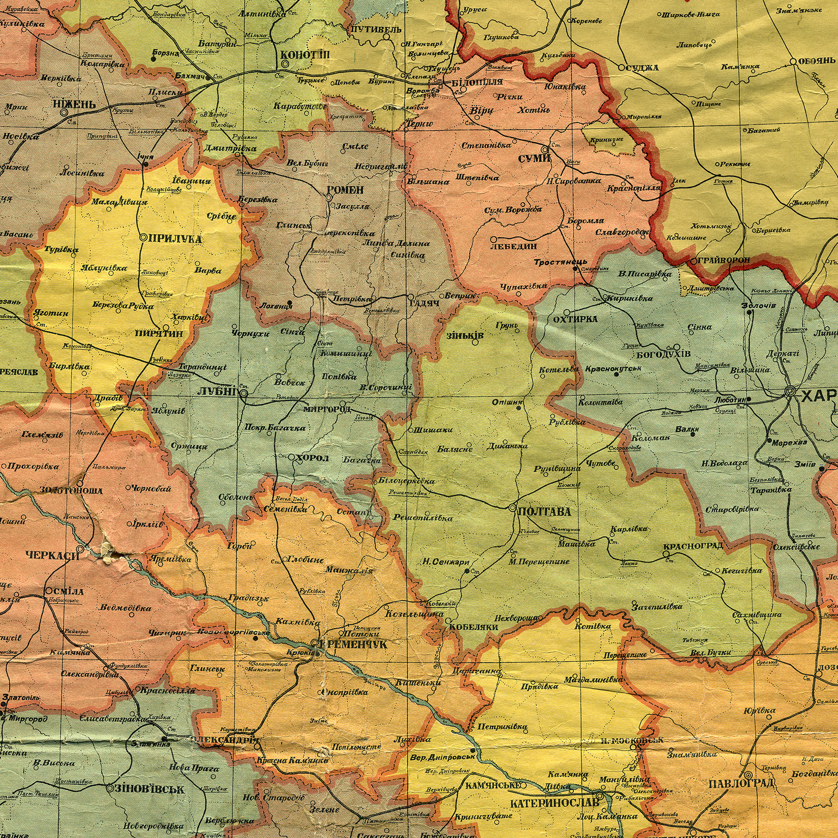 Територія колишньої Полтавської губернії, фрагмент мапи Української соц. рад. республіки, адміністративний поділ від 1 жовтня 1925